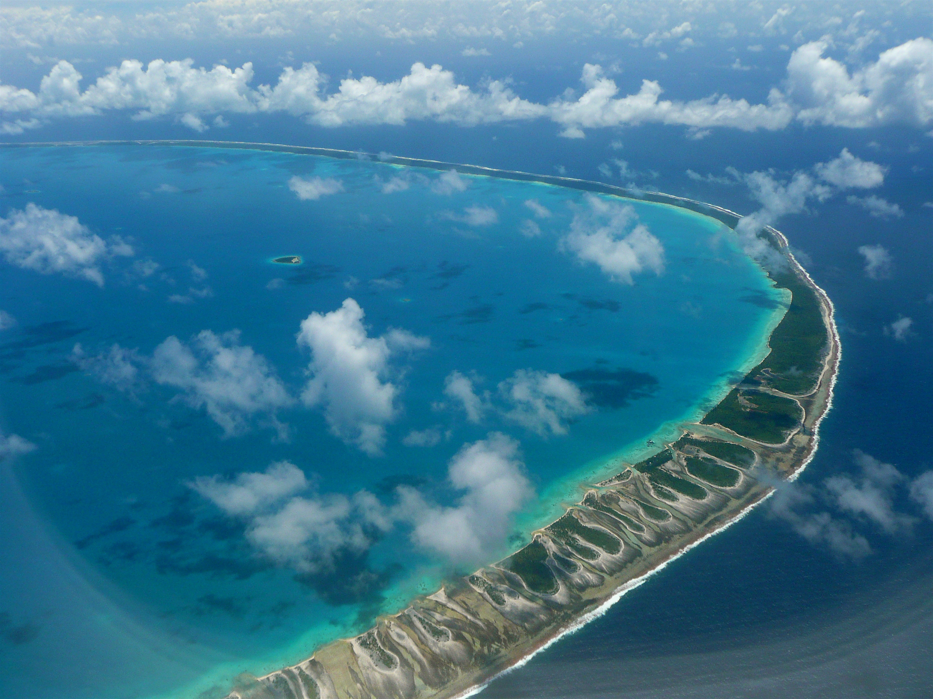 Tikehau, Tuamotu